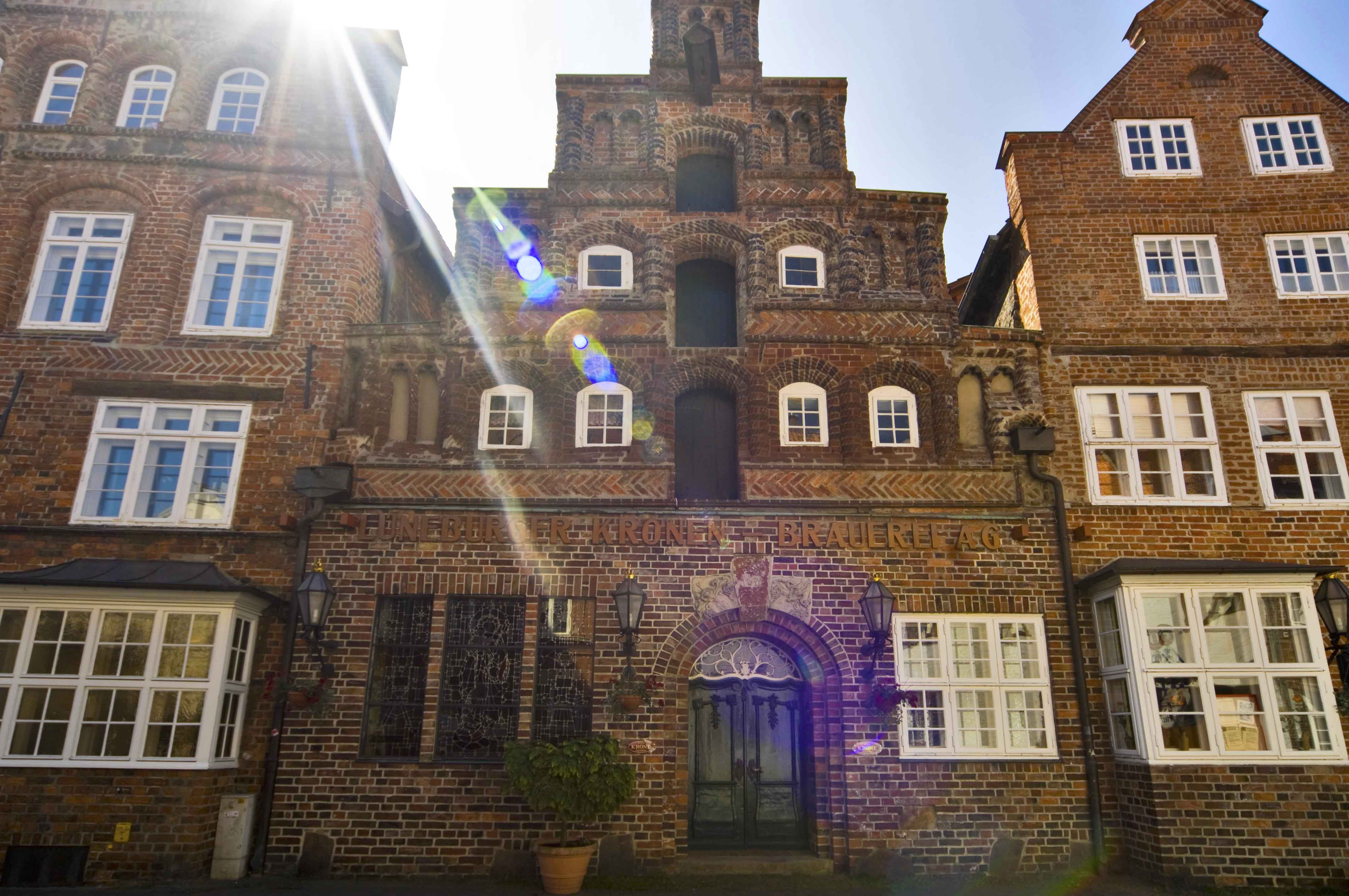 Die ehemalige Lüneburger Kronen Brauerei AG, im historischen Stadtzentrum der Hansestadt Lüneburg in Niedersachsen, Deutschland.